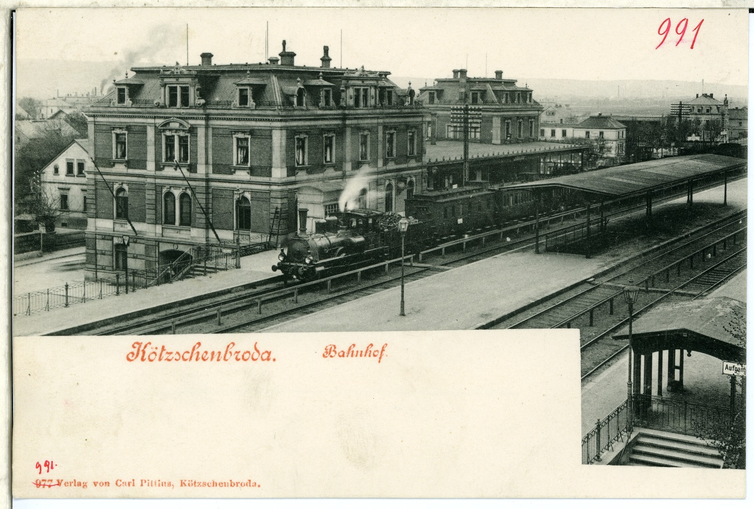 Kötzschenbroda; Bahnhof mit Eisenbahnzug This postcard is from publisher Brück & Sohn in Meißen ( postcard has a unique number 00991 and is available in a higher resolution at the publisher. This images was uploaded in a cooperation project between Wikipedians and the publisher.